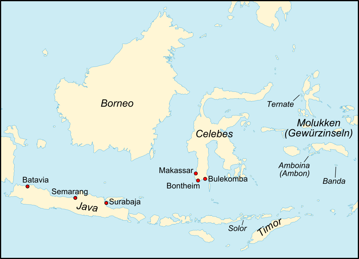 Einsatzorte des Kapregiments auf den Ostindischen Inseln und Celebes